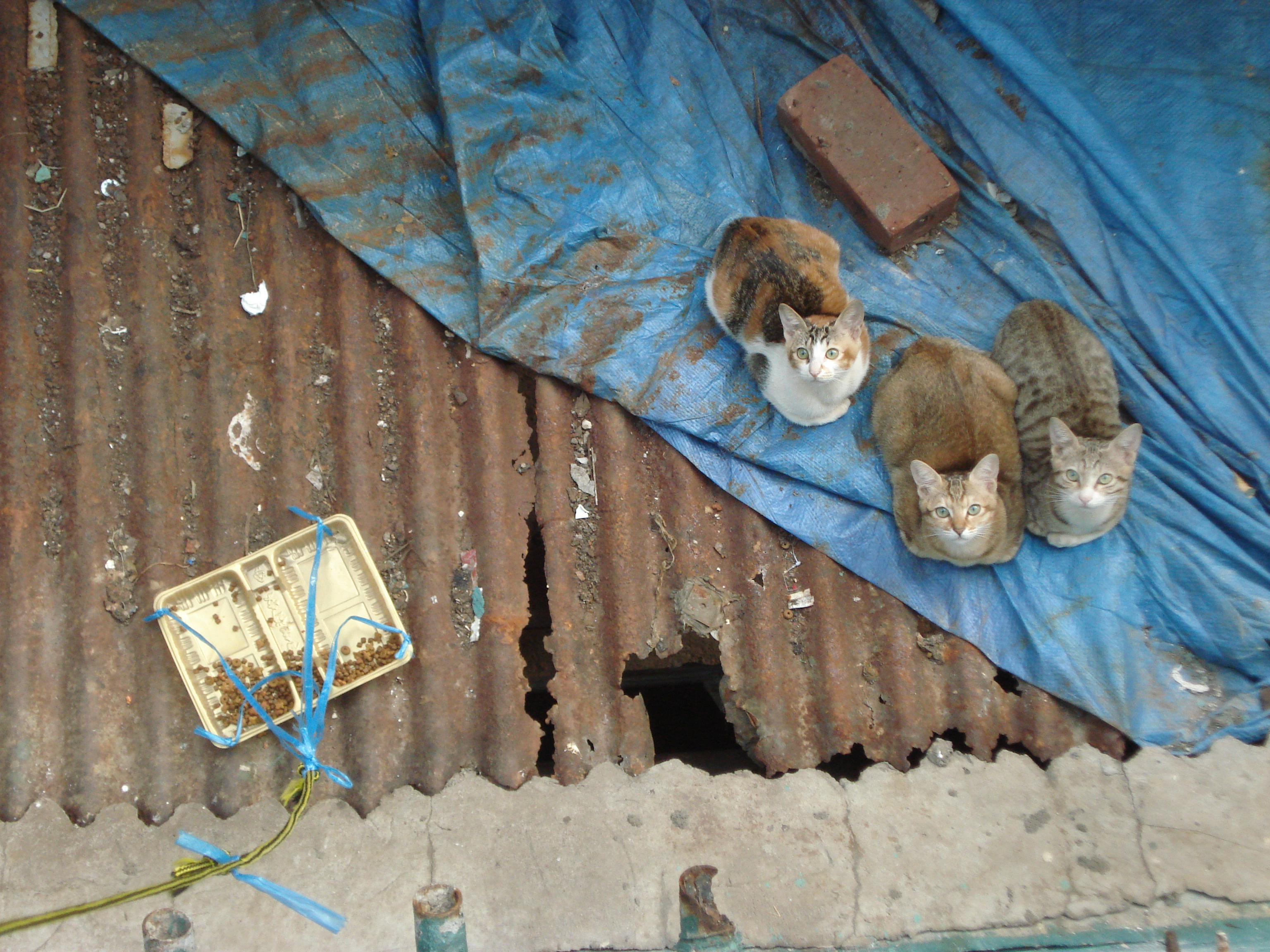 攝於2008年11月20日牛頭角下邨11座屋簷